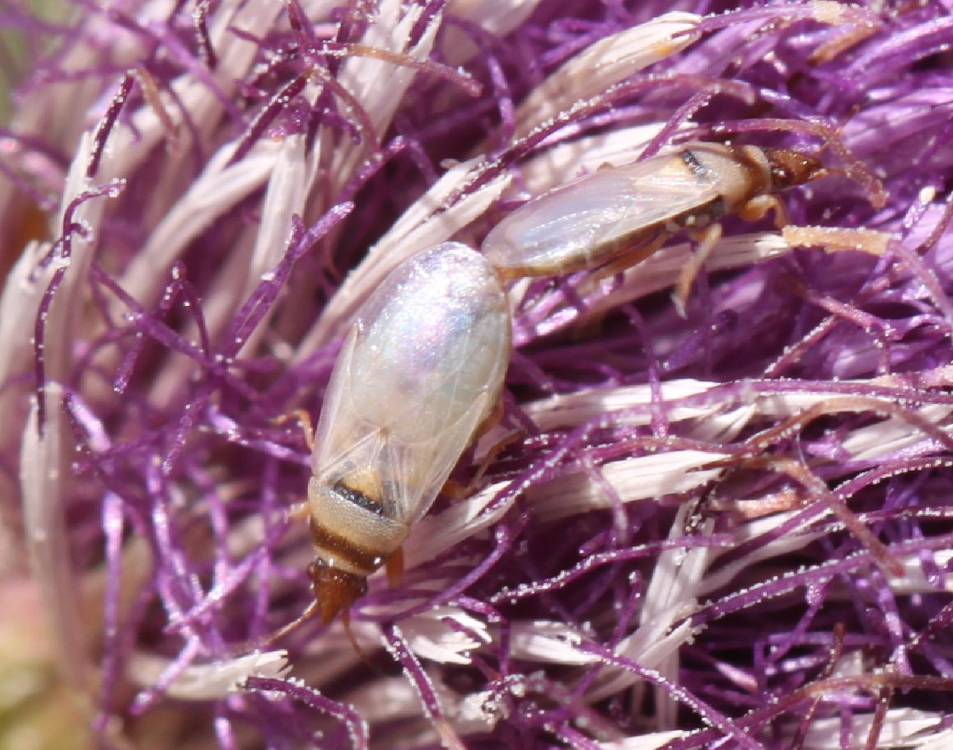 Oxycarenus pallens bei der Paarung auf der Blüte einer Kratzdistel am 26. Juli 2018 in Walldorf/Baden